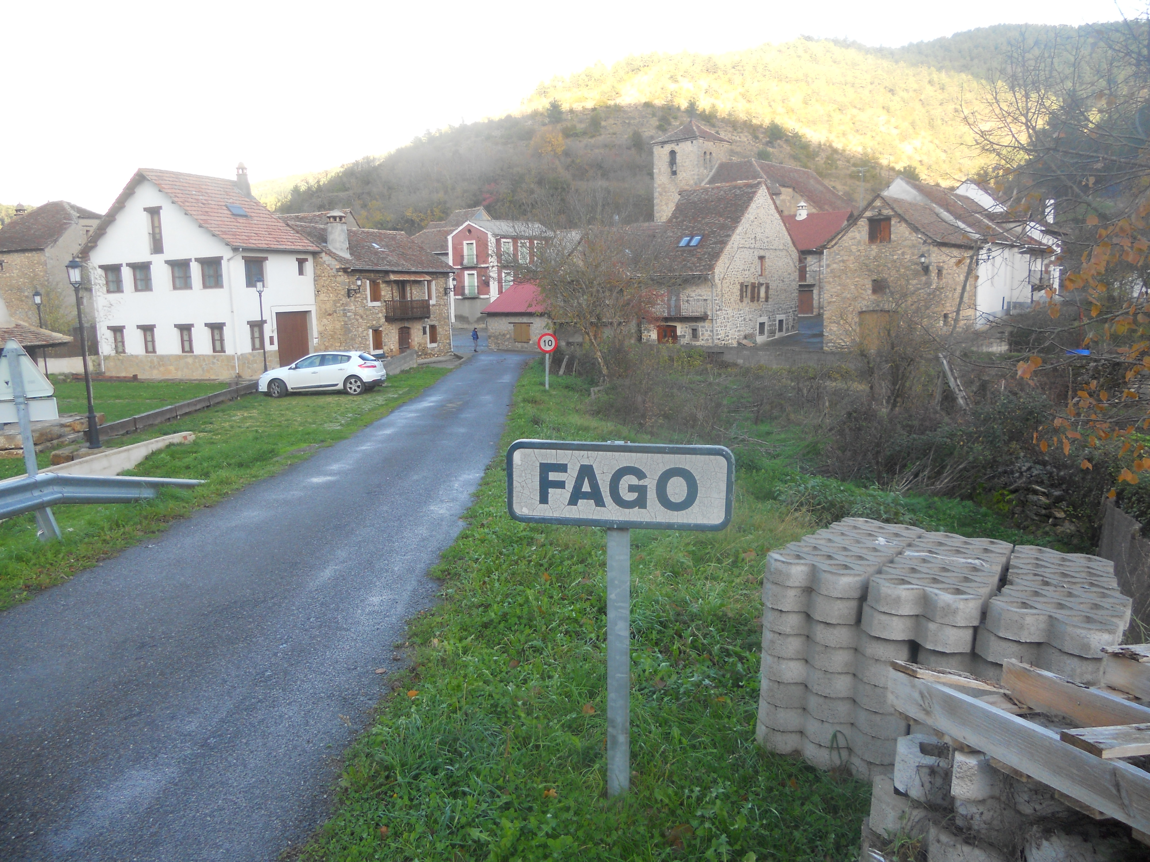 Fago , Huesca , España